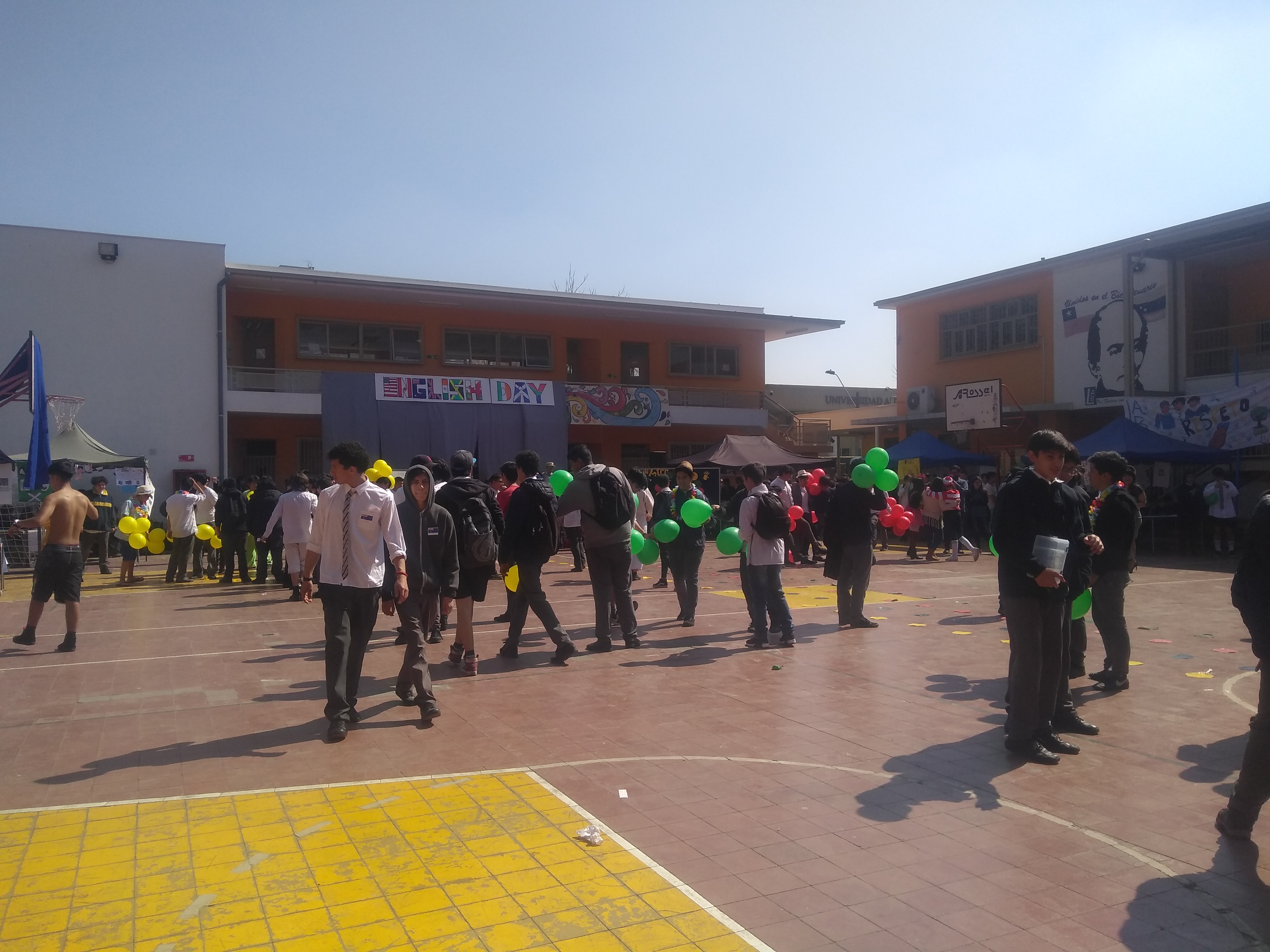 Patio principal del Liceo Andres Bello durante el English Day 2019